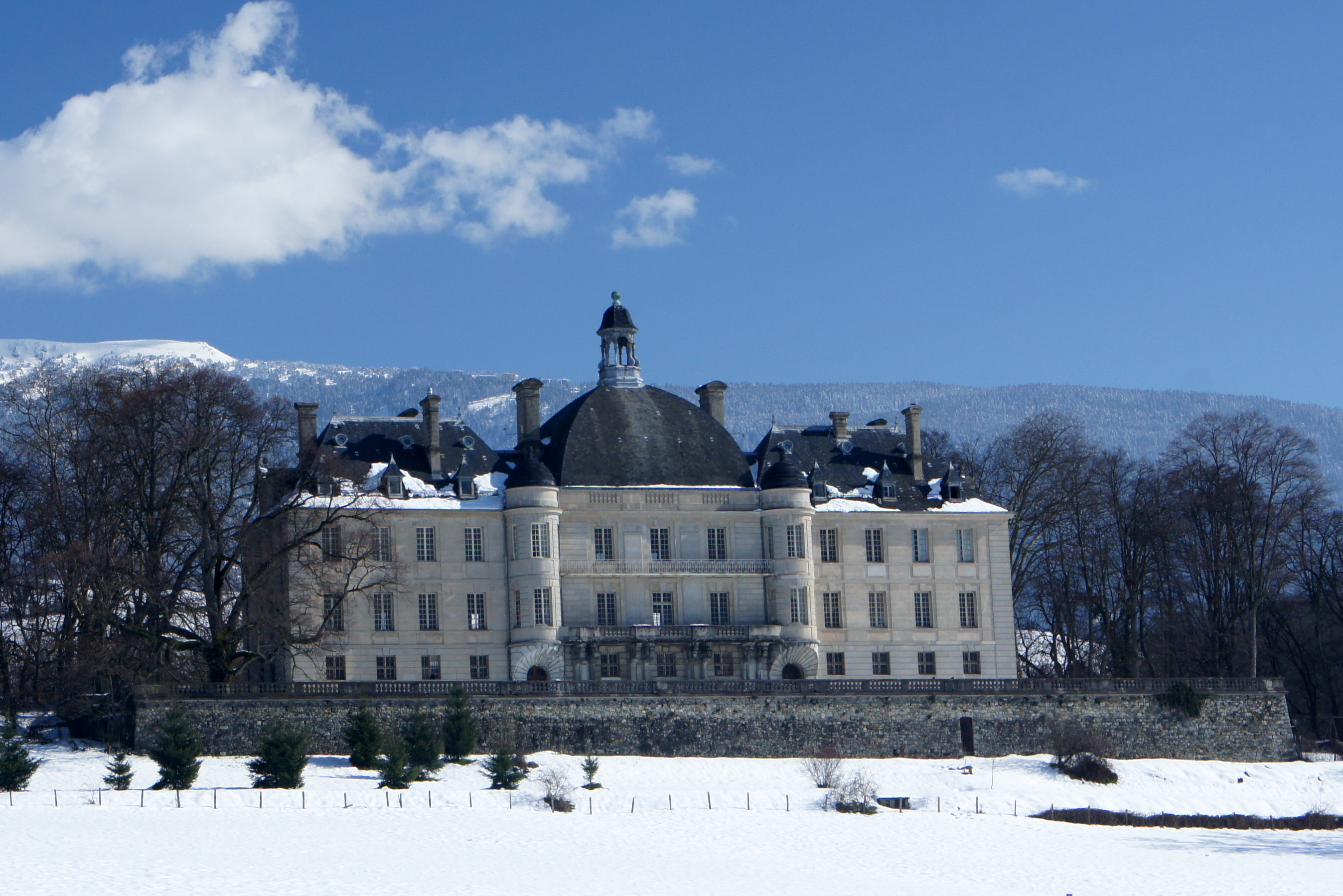 Château d'Herbeys (InscritClassé) .